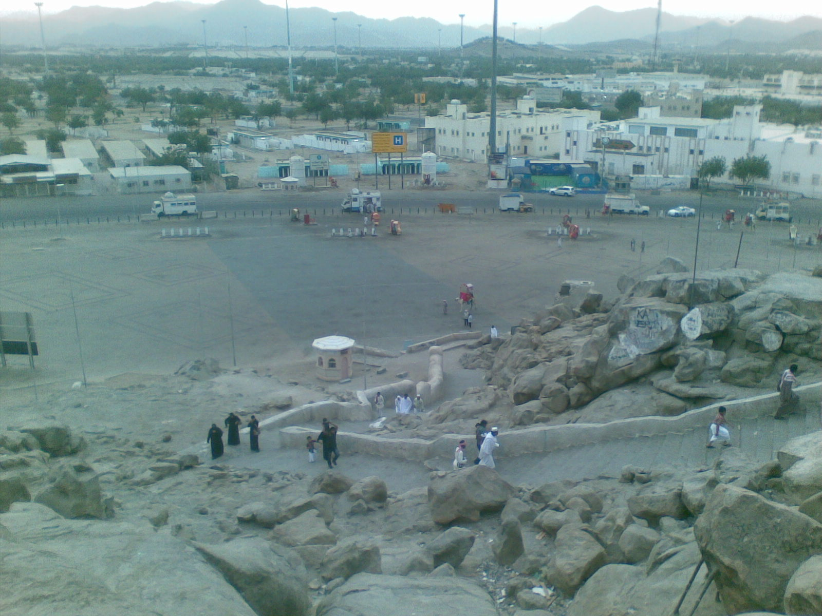 ഹജ്ജിന്റെ പ്രധാന ചടങ്ങായ അറഫാ സംഗമം നടക്കുന്ന നമിറ എന്ന പ്രദേശം.